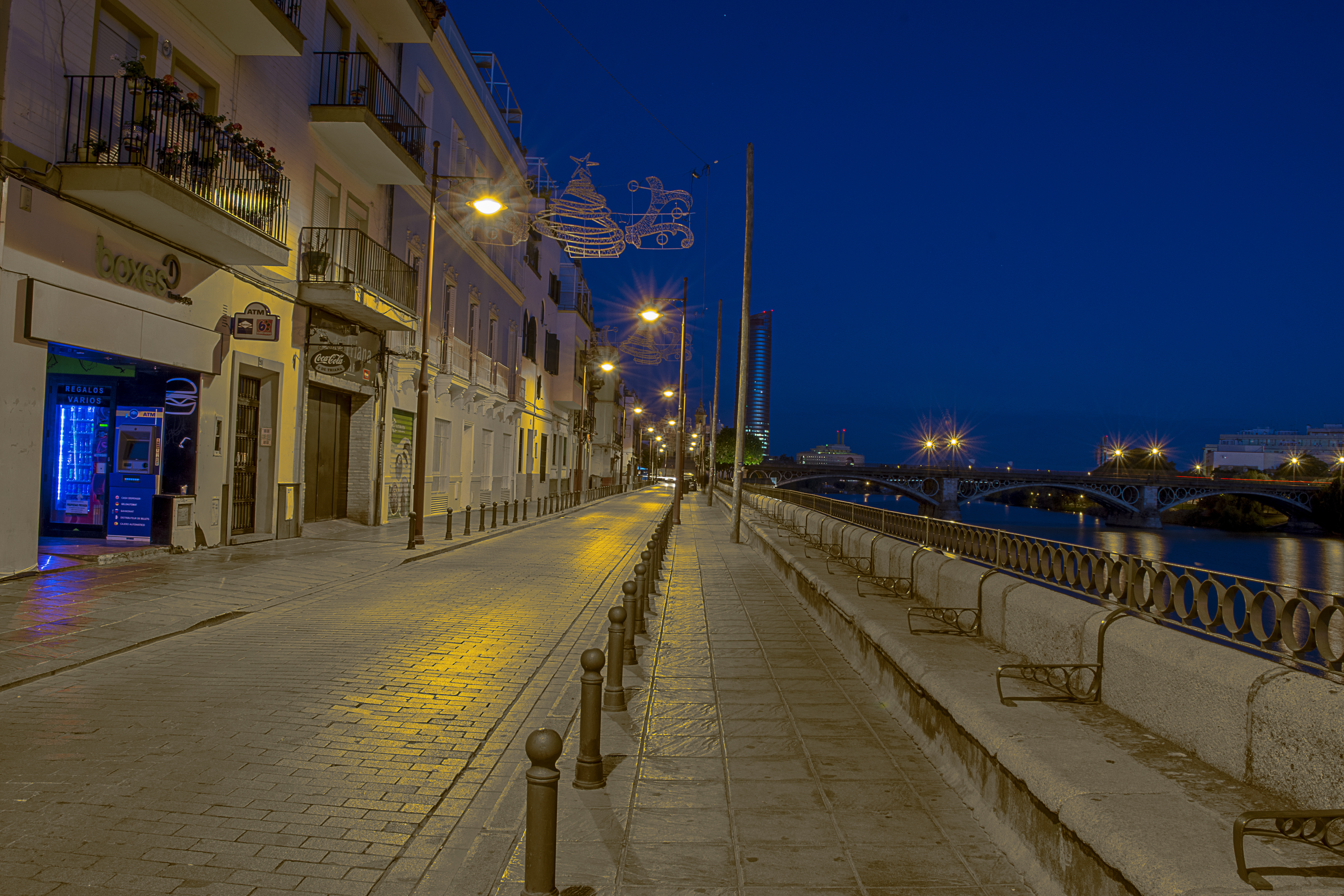 Vista de la calle Betis y al fondo el puente de Triana y la torre Sevilla. (Sevilla).